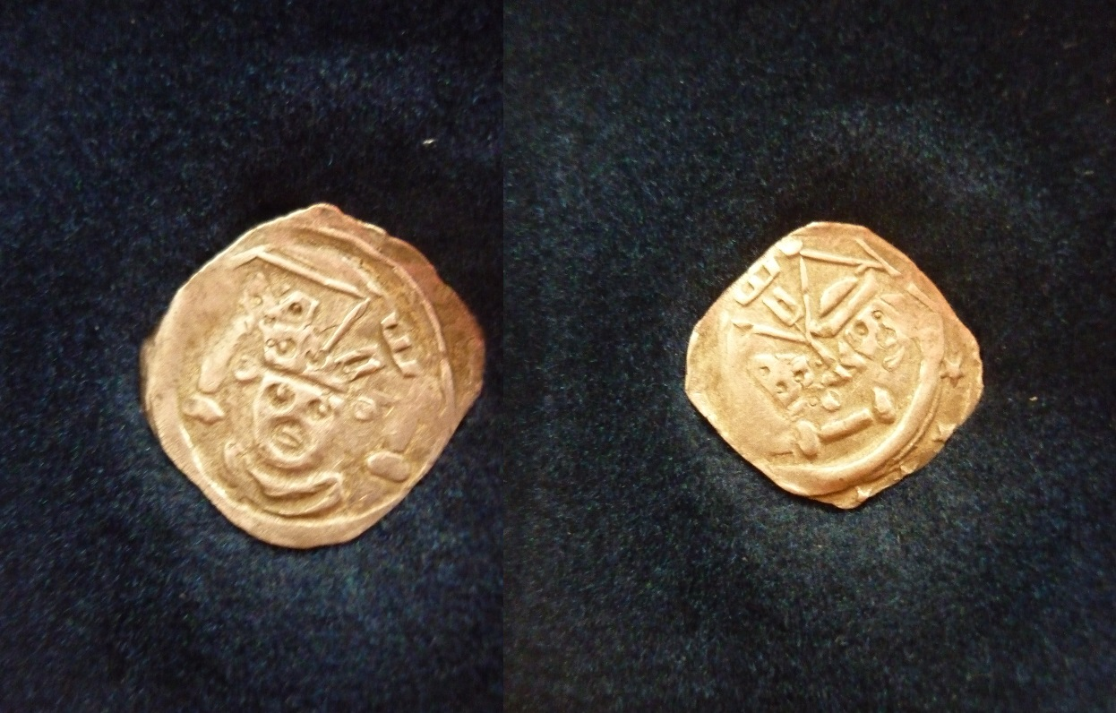 Pfennig Heinrich II. von Roteneck Fürstbischof Regensburg 1277 - 1296